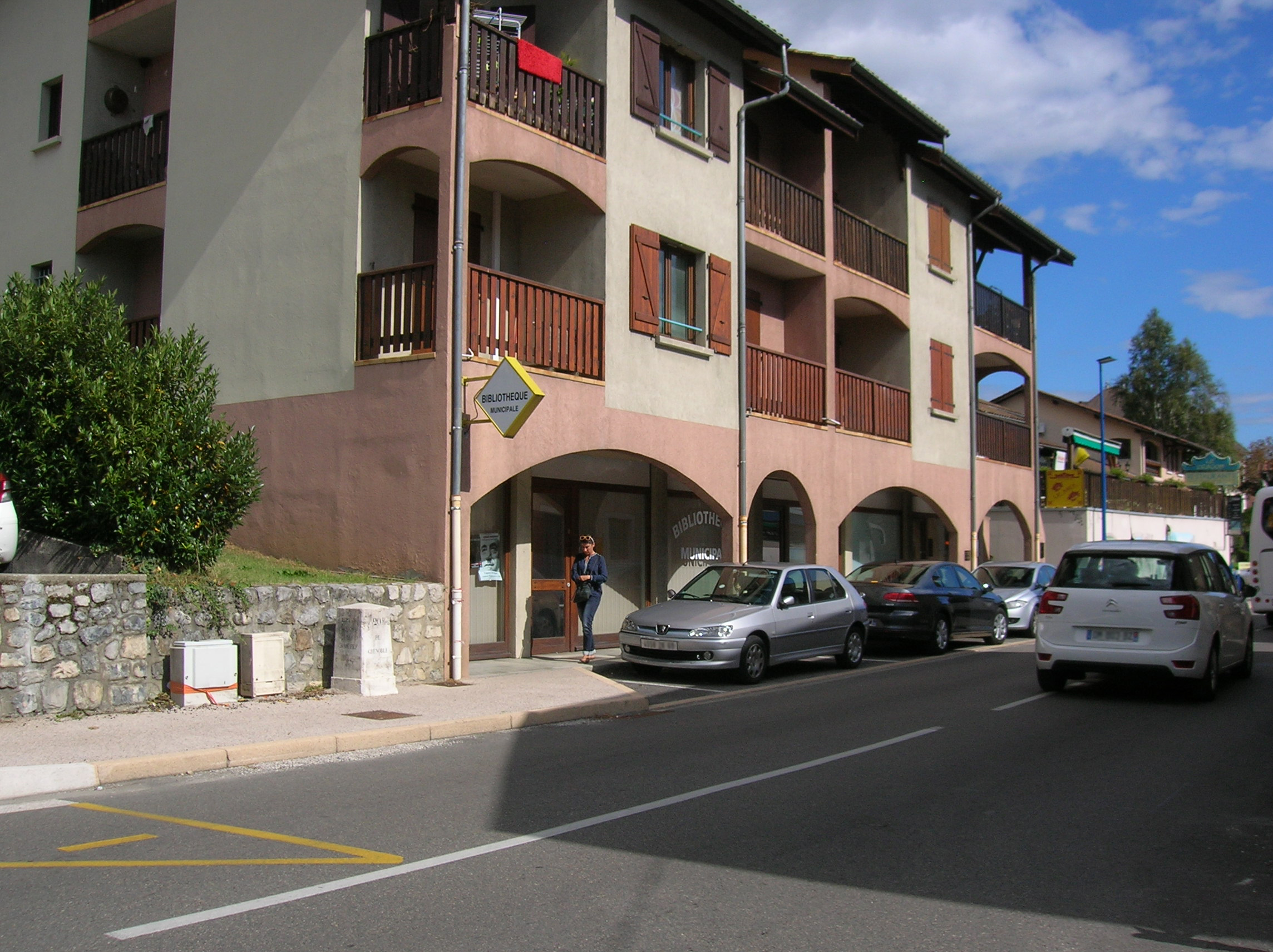 Bibliothèque. Lumbin un jour de Coupe Icare. Lumbin, Isère, France.